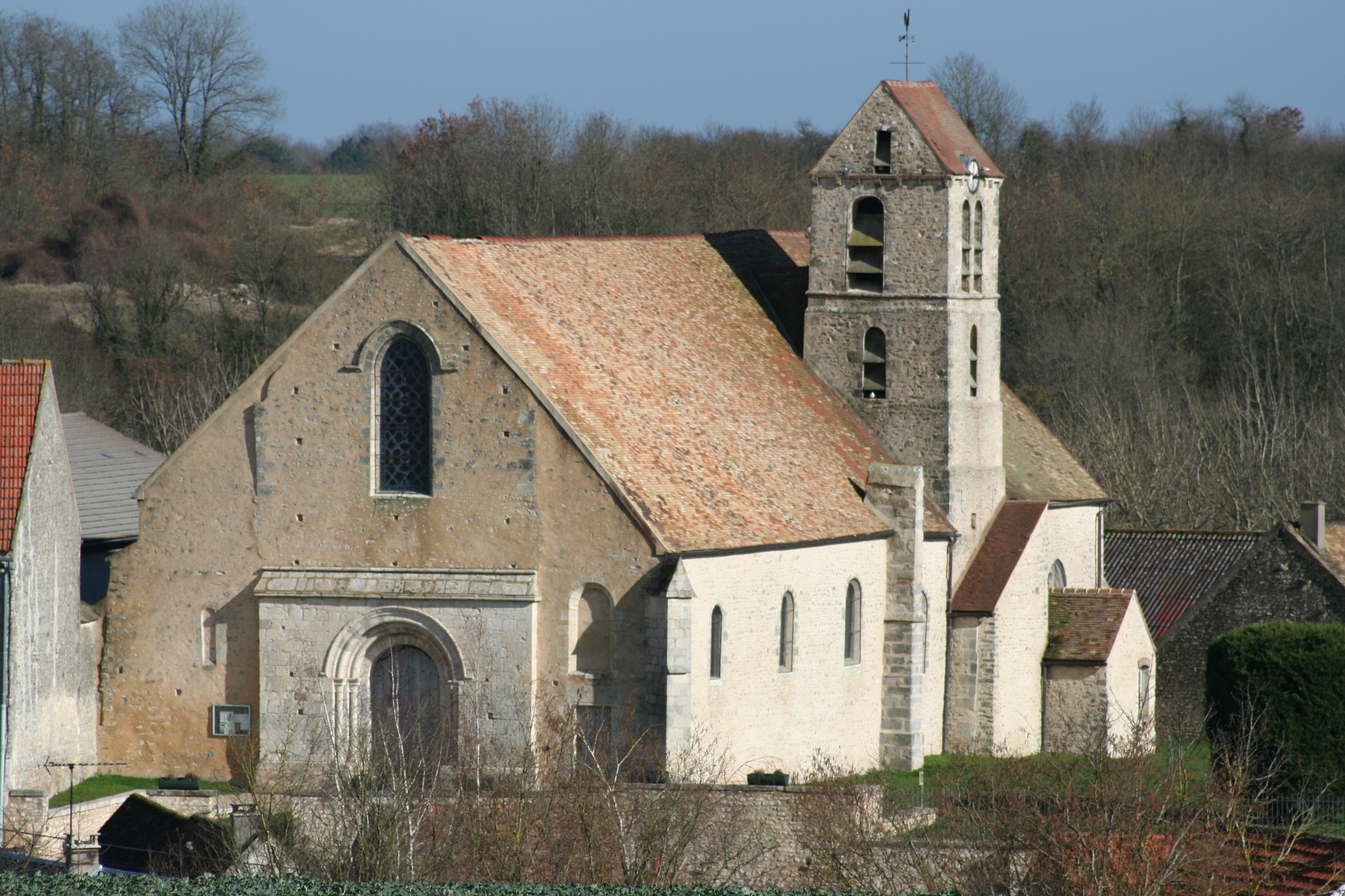 Eglise Saint Aignan de Chalou-Moulineux dans l'Essonne